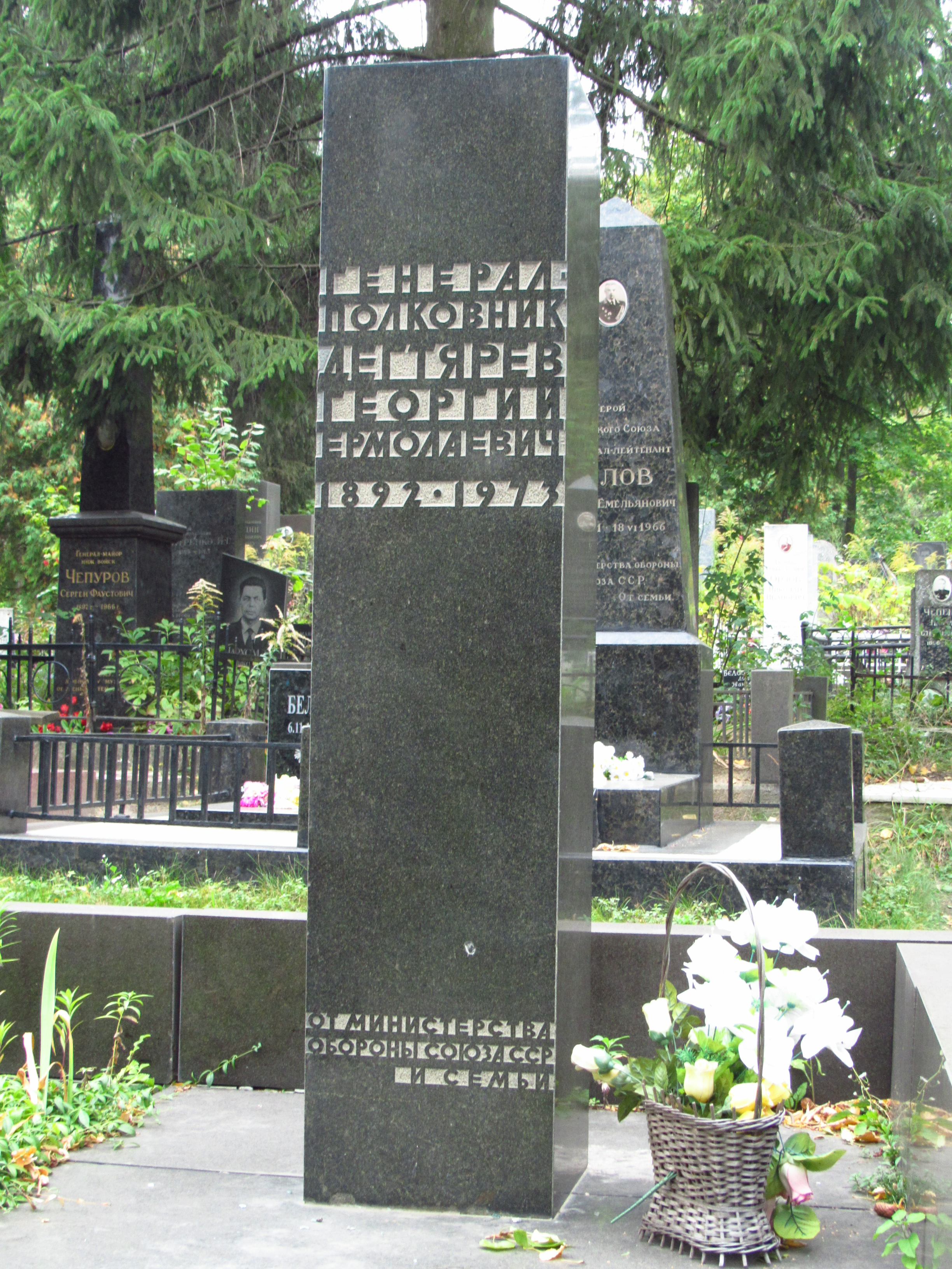 Могила Дехтярьова Г. Е., Київ, Байкова вул., 6, діл. 46